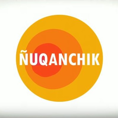 Logo del noticiero peruano Ñuqanchik